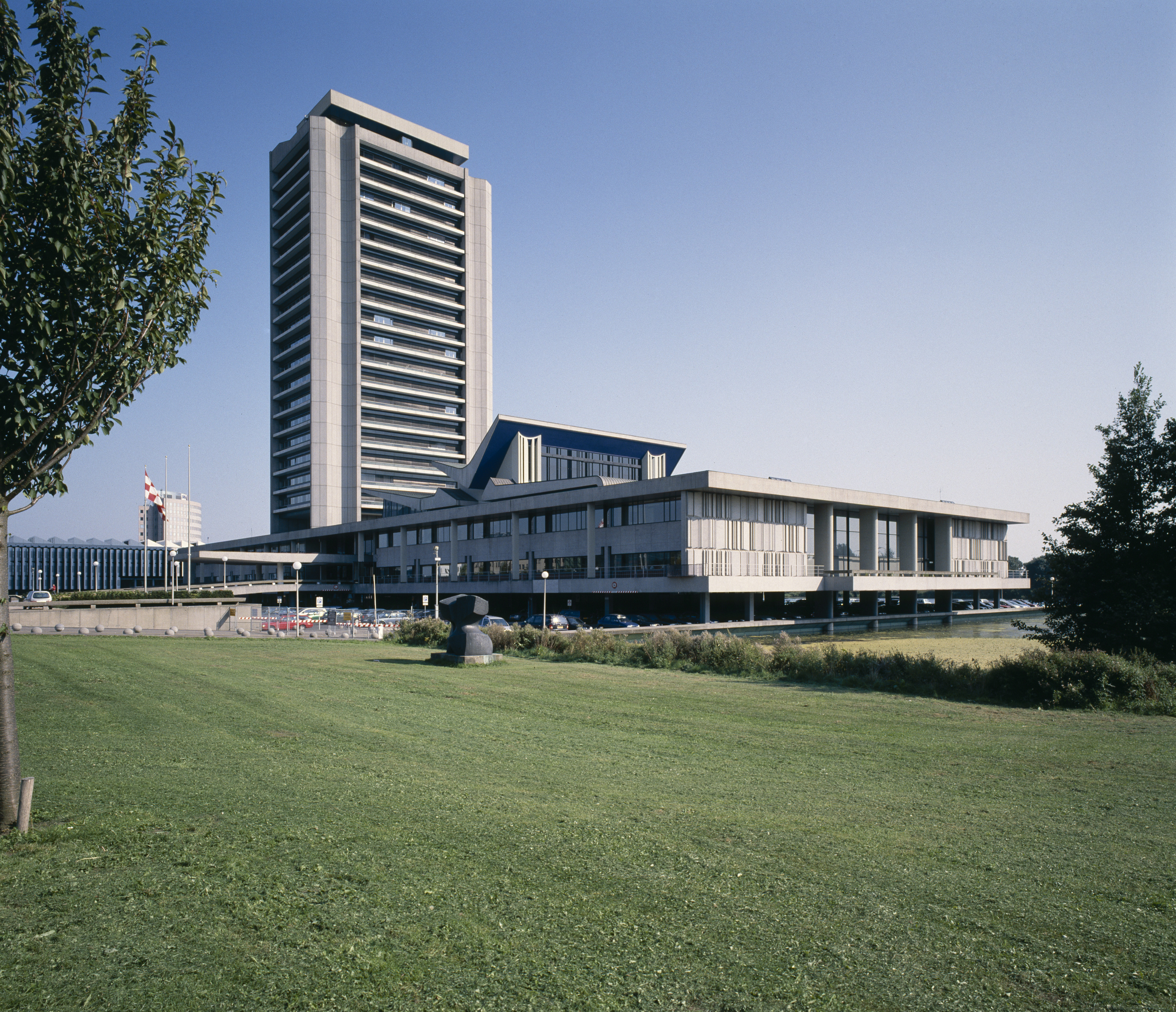 Provinciehuis: Overzicht